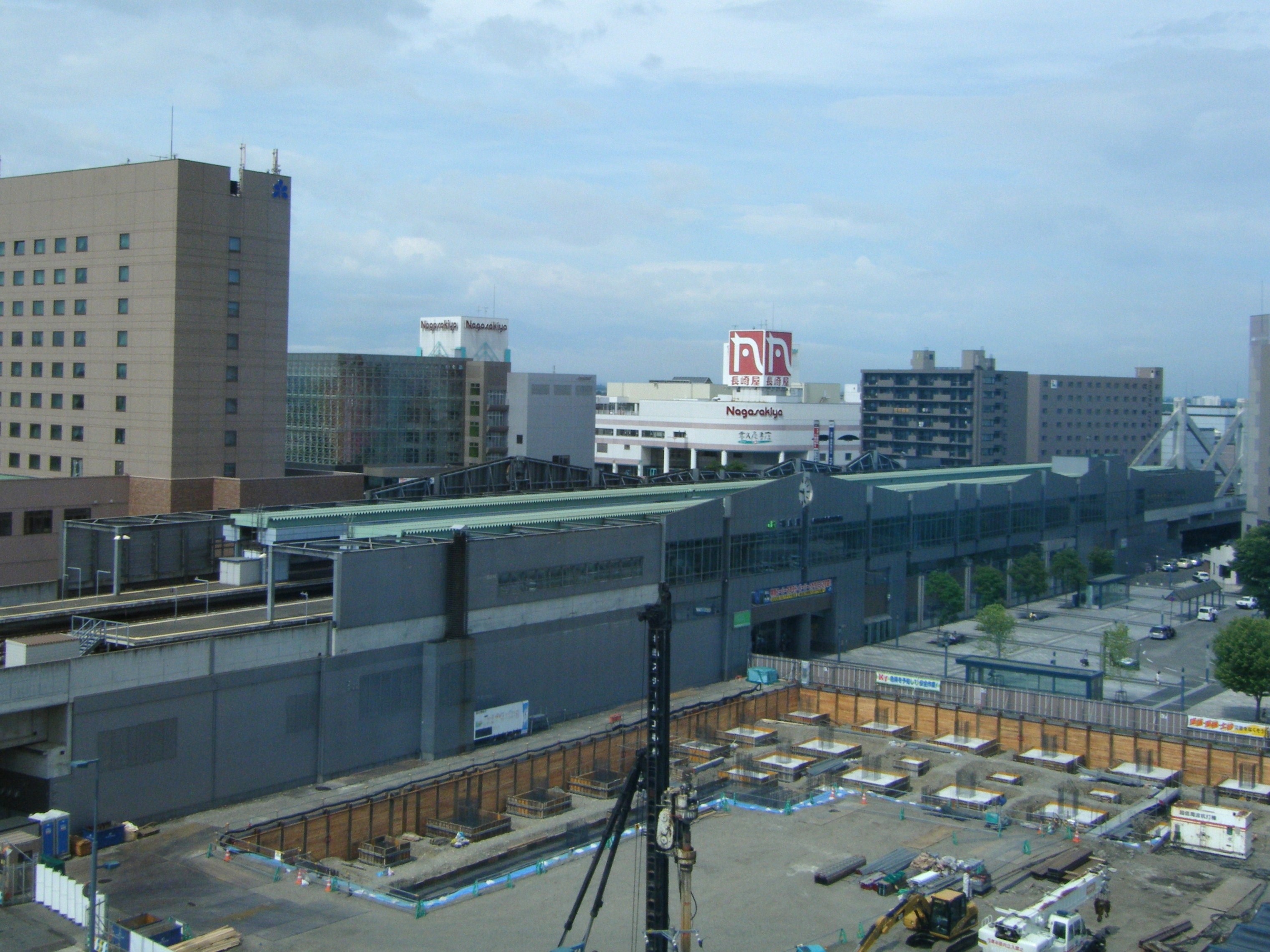 帯広駅北口からの俯瞰